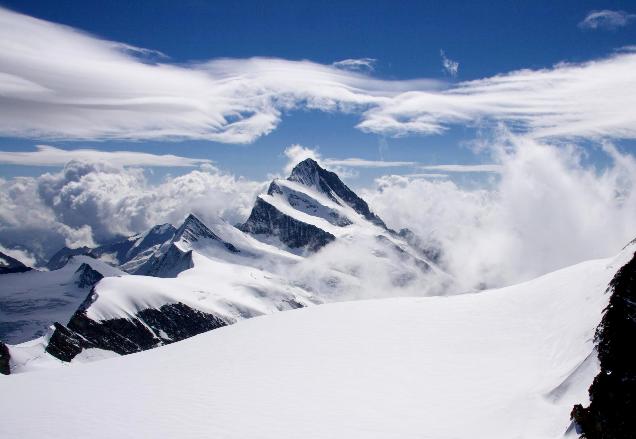 Finsteraarhorn, Bernese Alps